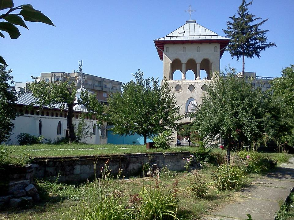 Fundațiile clădirilor anexă 02